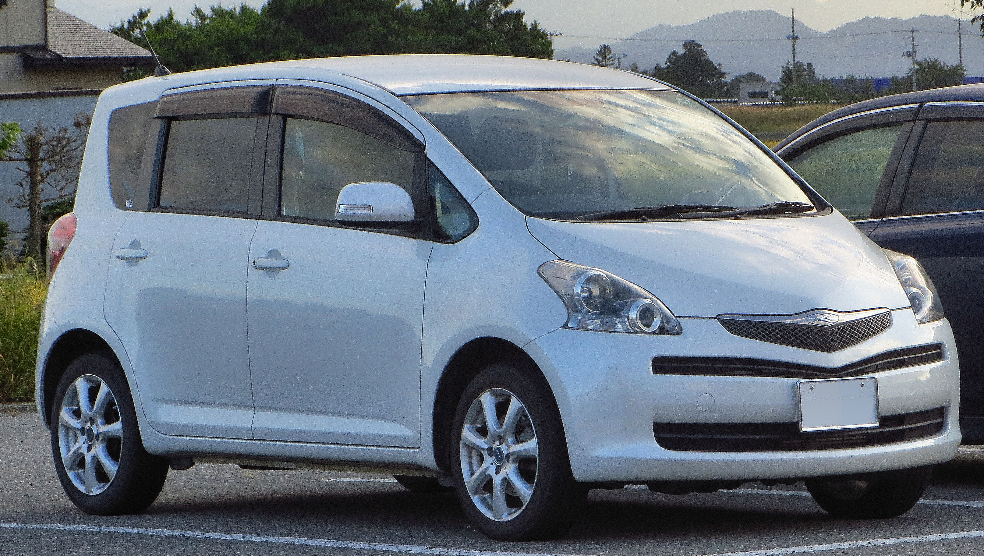 トヨタ ラクティス X Lパッケージ 1300